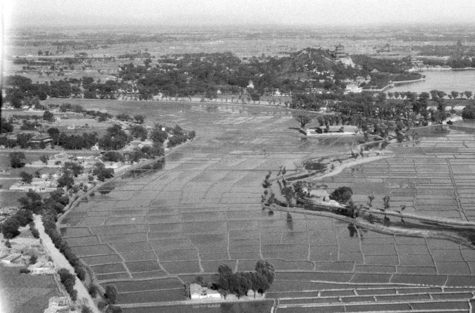 北京功德寺